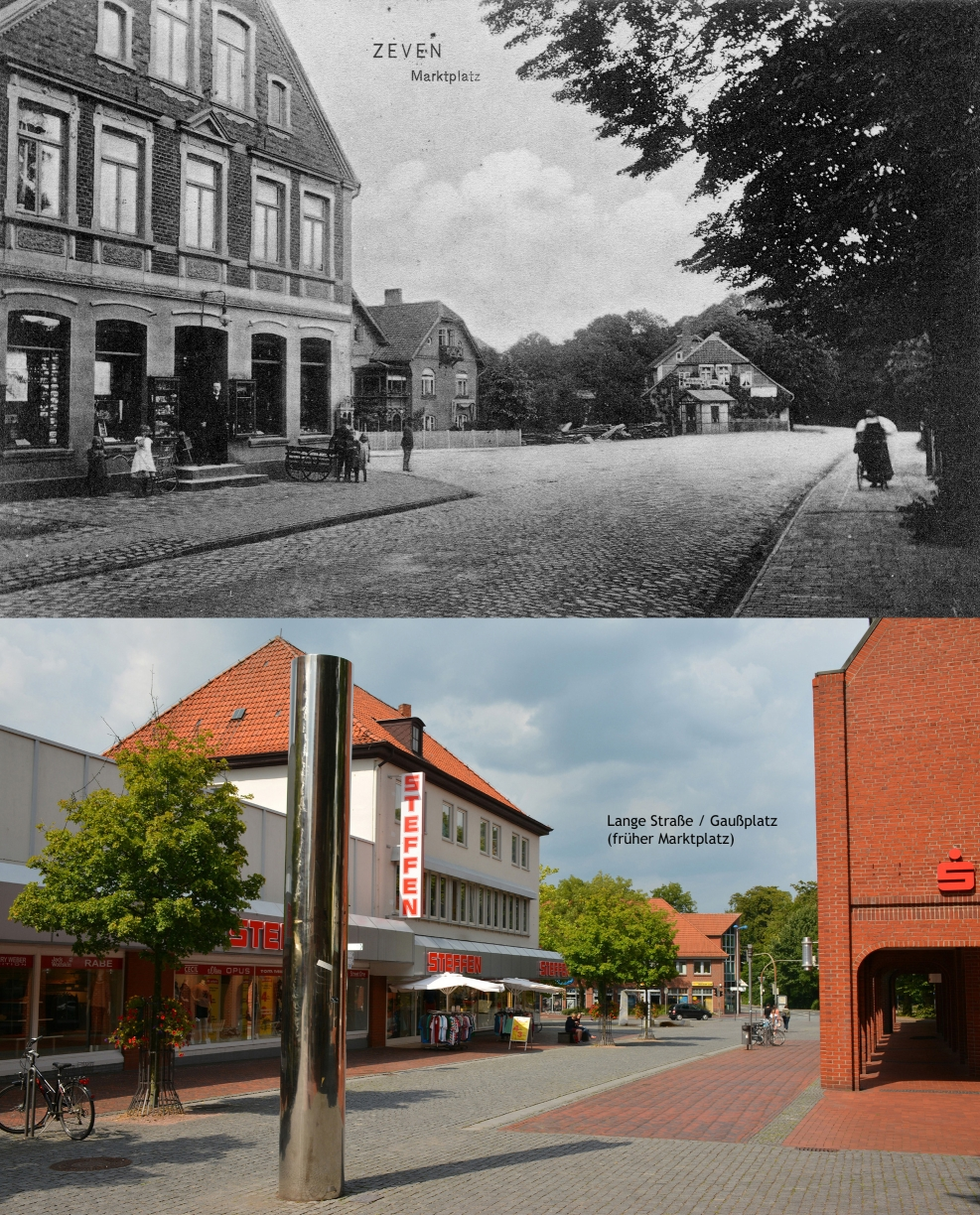 Marktplatz-Gaußplatz in Zeven